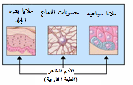 النسج المشتقة من الأديم الظاهر